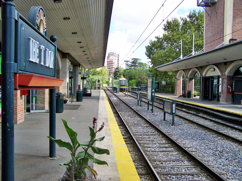 Estación Libertador